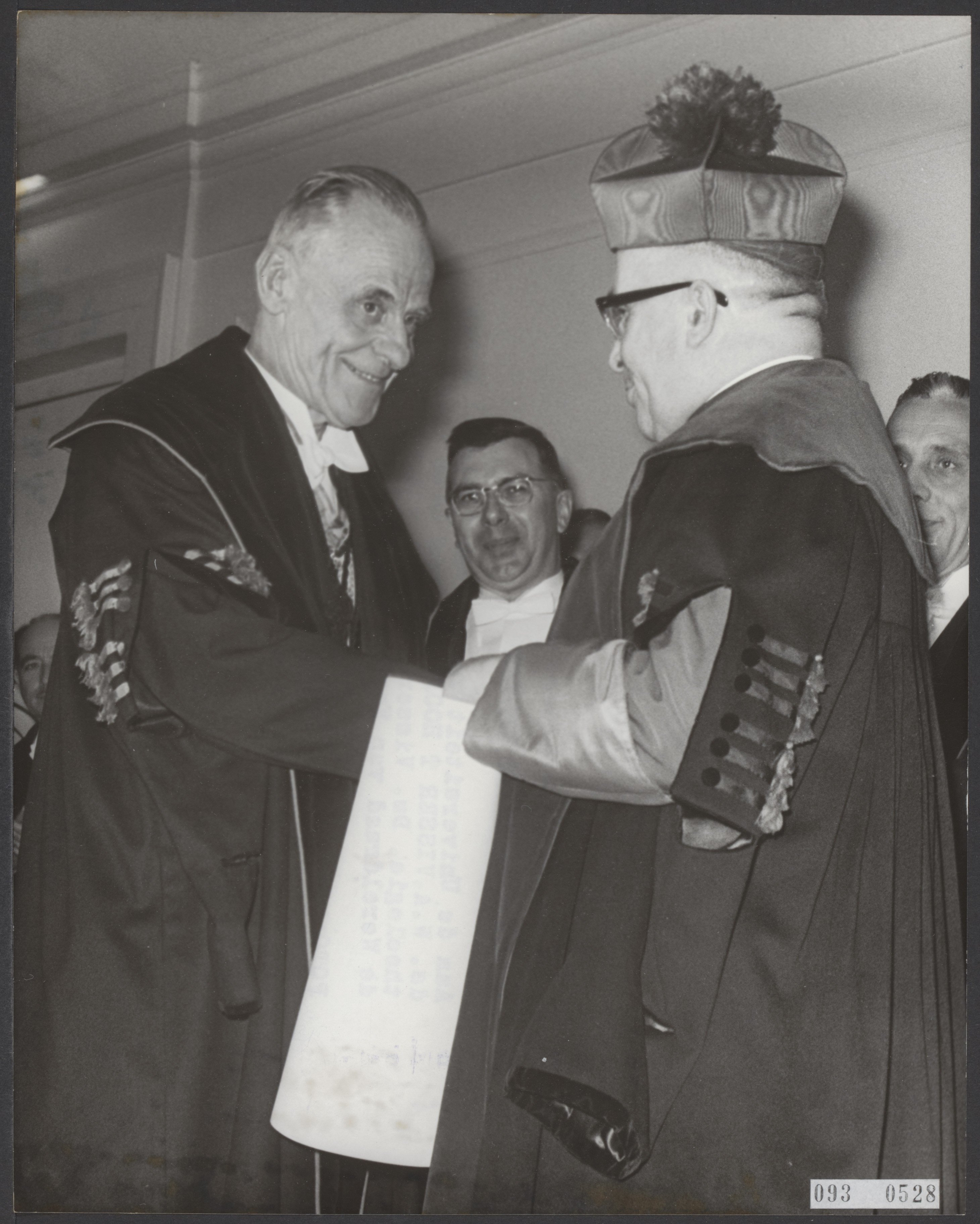 Collectie / Archief : Fotocollectie Elsevier Reportage / Serie : [ onbekend ] Beschrijving : Aan de universiteit van Leuven (België) kreeg ds. W.A. Visser 't Hooft het eredoctoraat theologie. Ds. Visser 't Hooft was voorzitter van de Wereldraad van Kerken van 1948 tot 1966. De rector magnificus van de universiteit prof. A. Descamps (rechts) hangt ds. W.A. Visser 't Hooft de cappa om Datum : 2 februari 1967 Locatie : Leuven Trefwoorden : eredoctoraten, theologie, universiteiten Persoonsnaam : Descamps, A., Visser 't Hooft, Wim Fotograaf : Koch, Eric / Anefo Auteursrechthebbende : Nationaal Archief Materiaalsoort : Foto (zwart/wit) Nummer archiefinventaris : bekijk toegang 2.24.05.02 Bestanddeelnummer : 093-0528